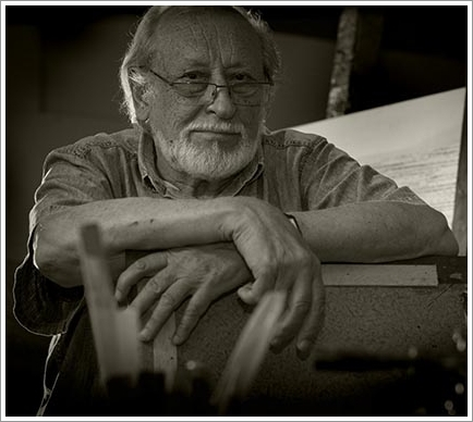 Pintor informalista